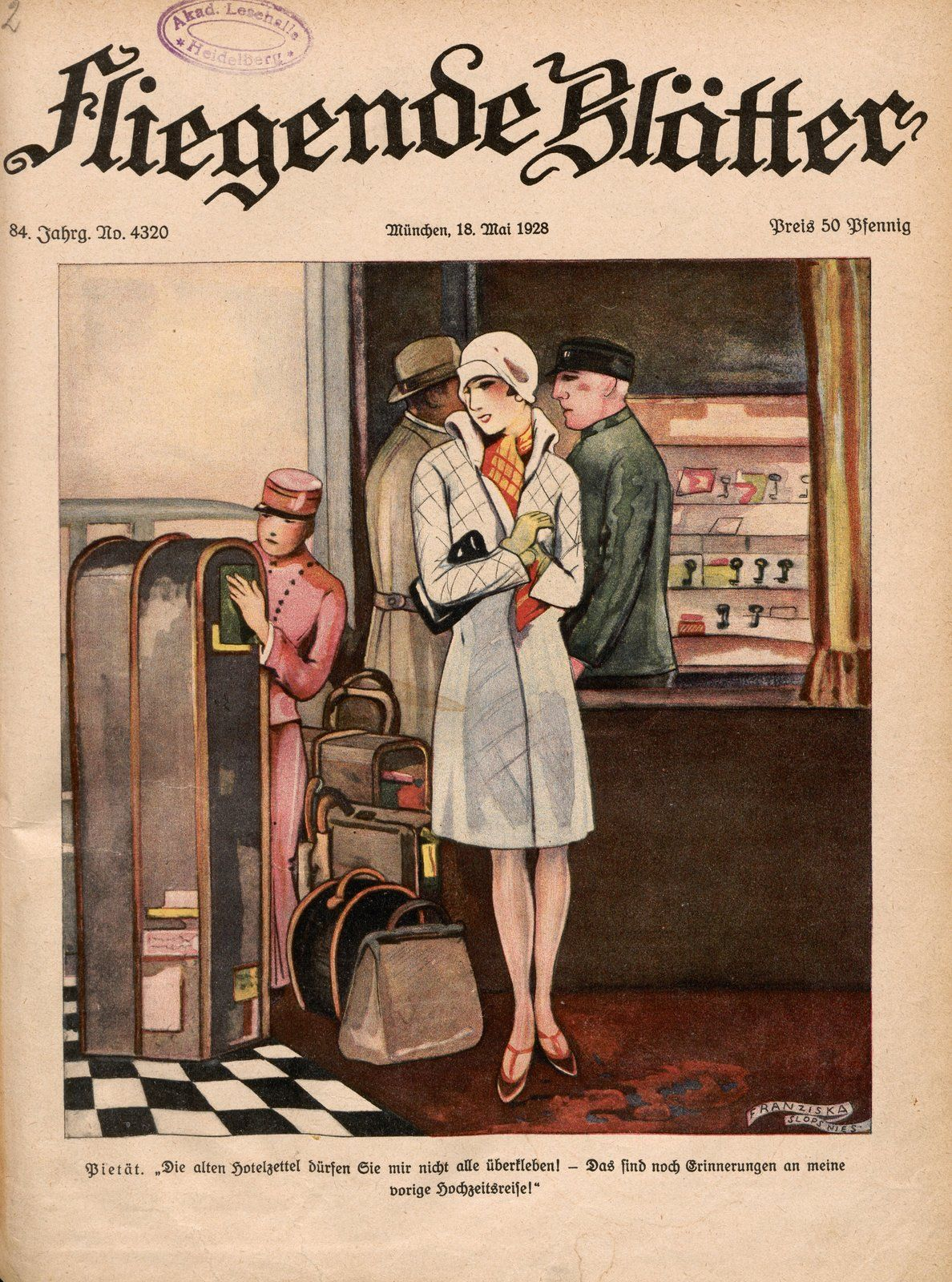 Franziska Schlopsnies (Slopsnies): "Pietät", Fliegende Blätter, 928, Nr. 4320, S. 240c